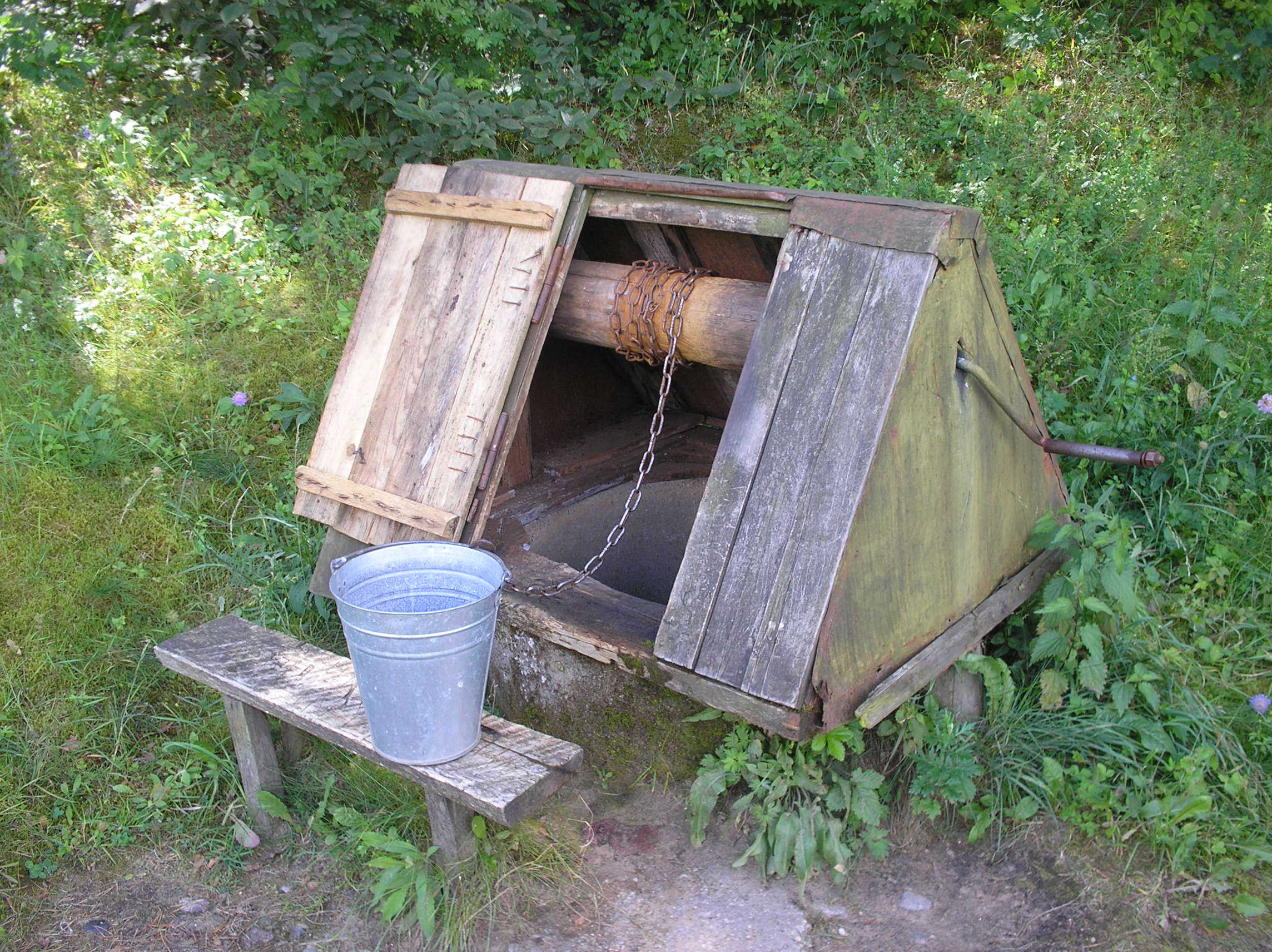 Русский колодец